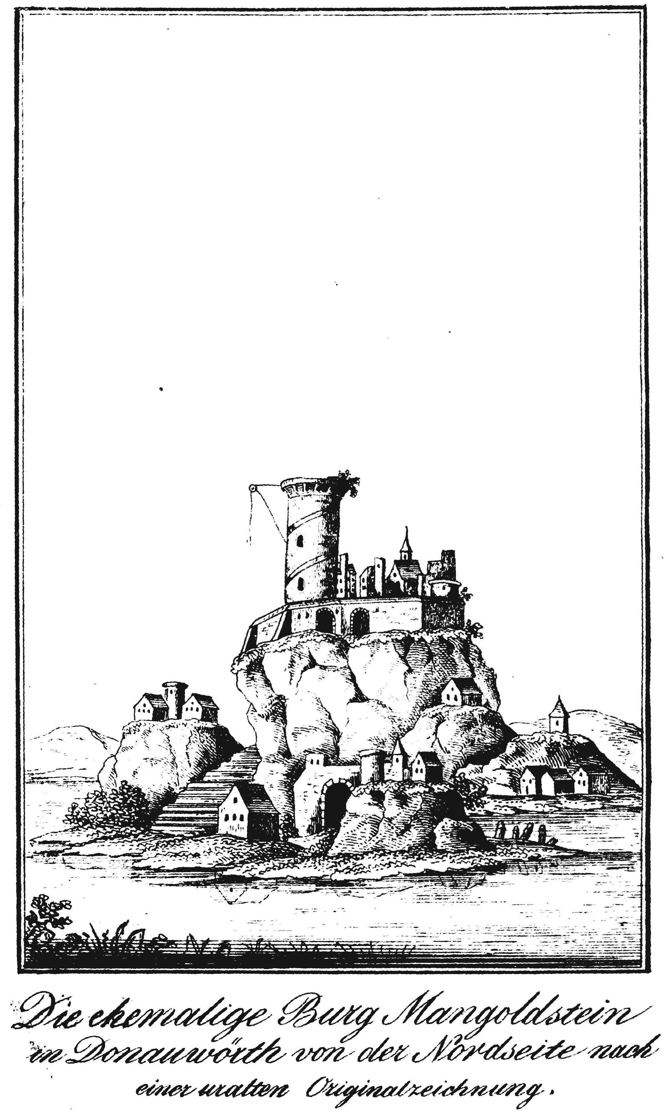 Die ehemalige Burg Mangoldstein in Donauwörth von der Nordseite, nach einer uralten Originalzeichnung.